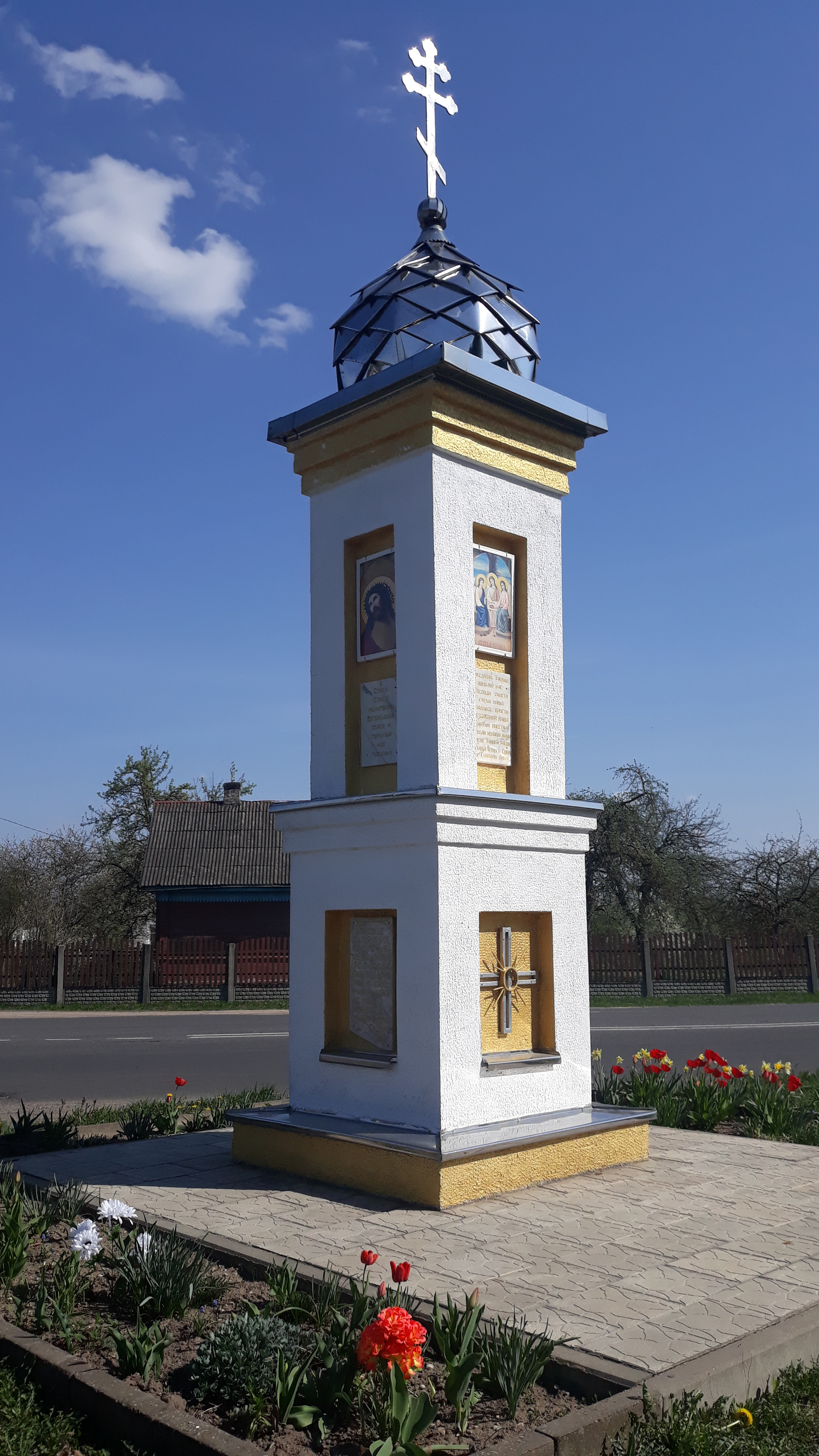 Прыдарожная капліцаапліца ў вёсцы Мянюткі